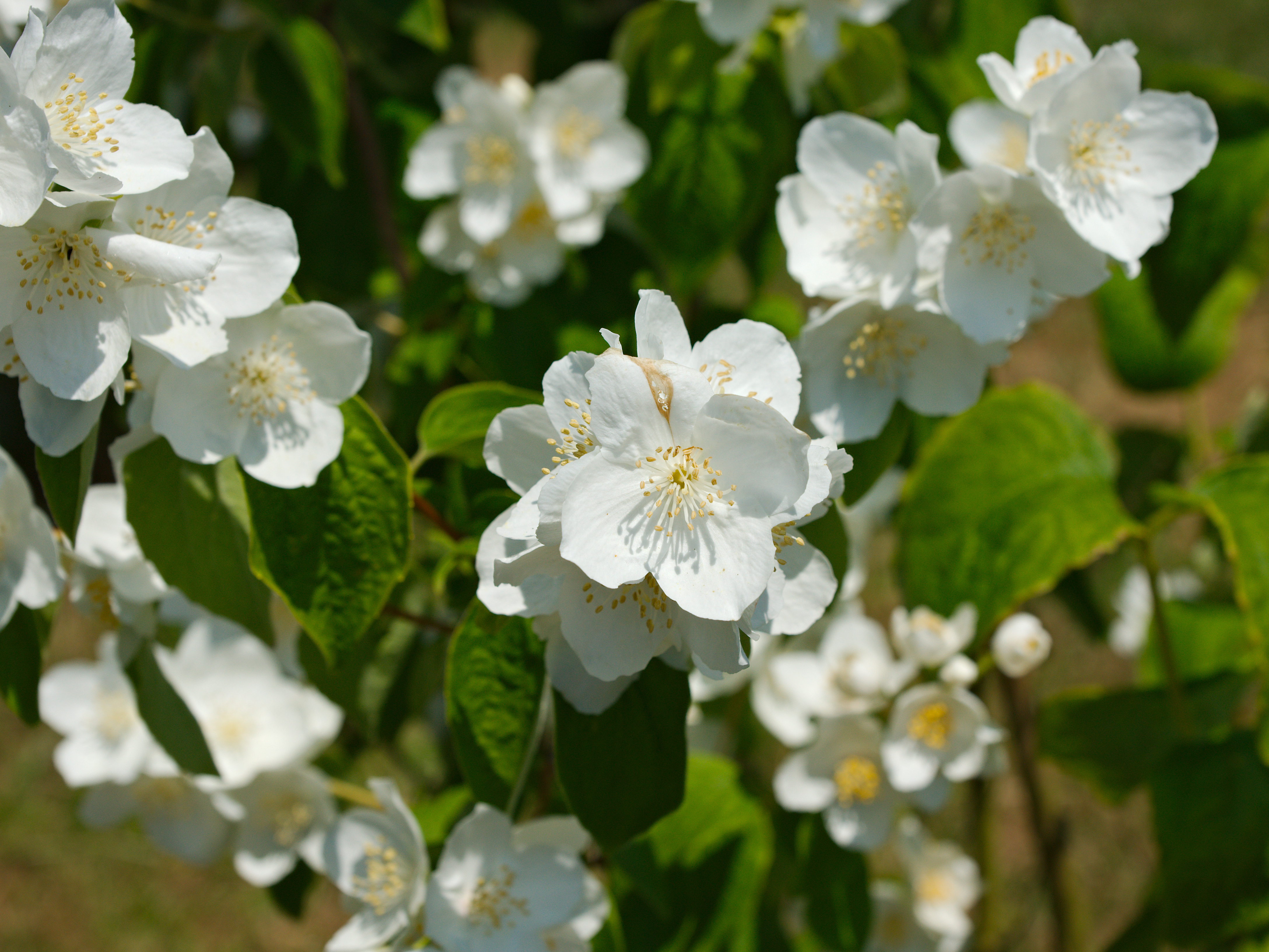 Fleur de Philadelphus inodorus Grandiflorus du jardin d’Amérique du Nord des Jardins Suspendus du Havre dans l’ancien fort de Sainte-Adresse